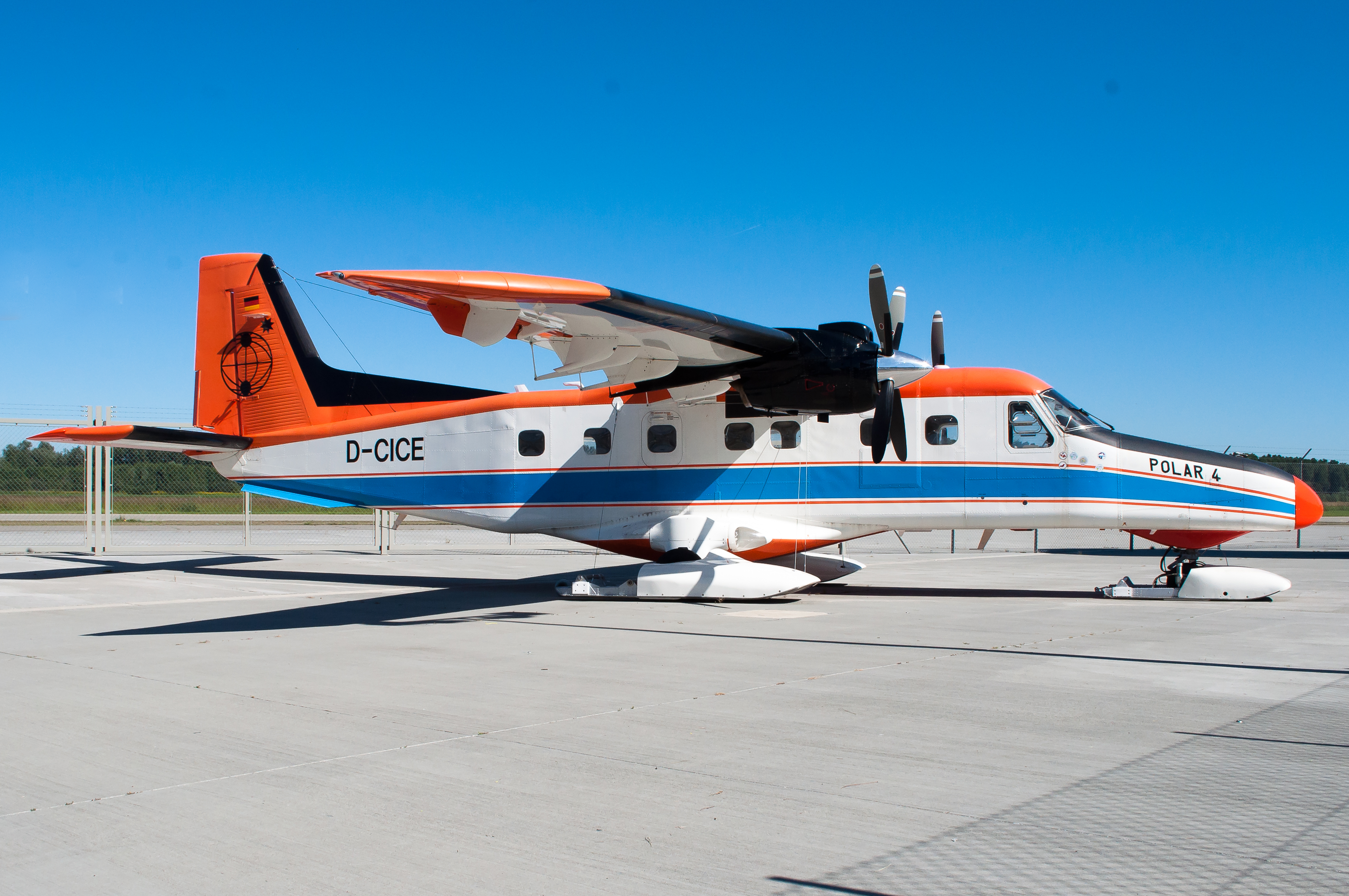 DO-228 Polar at the Dornier Museum Friedrichshafen